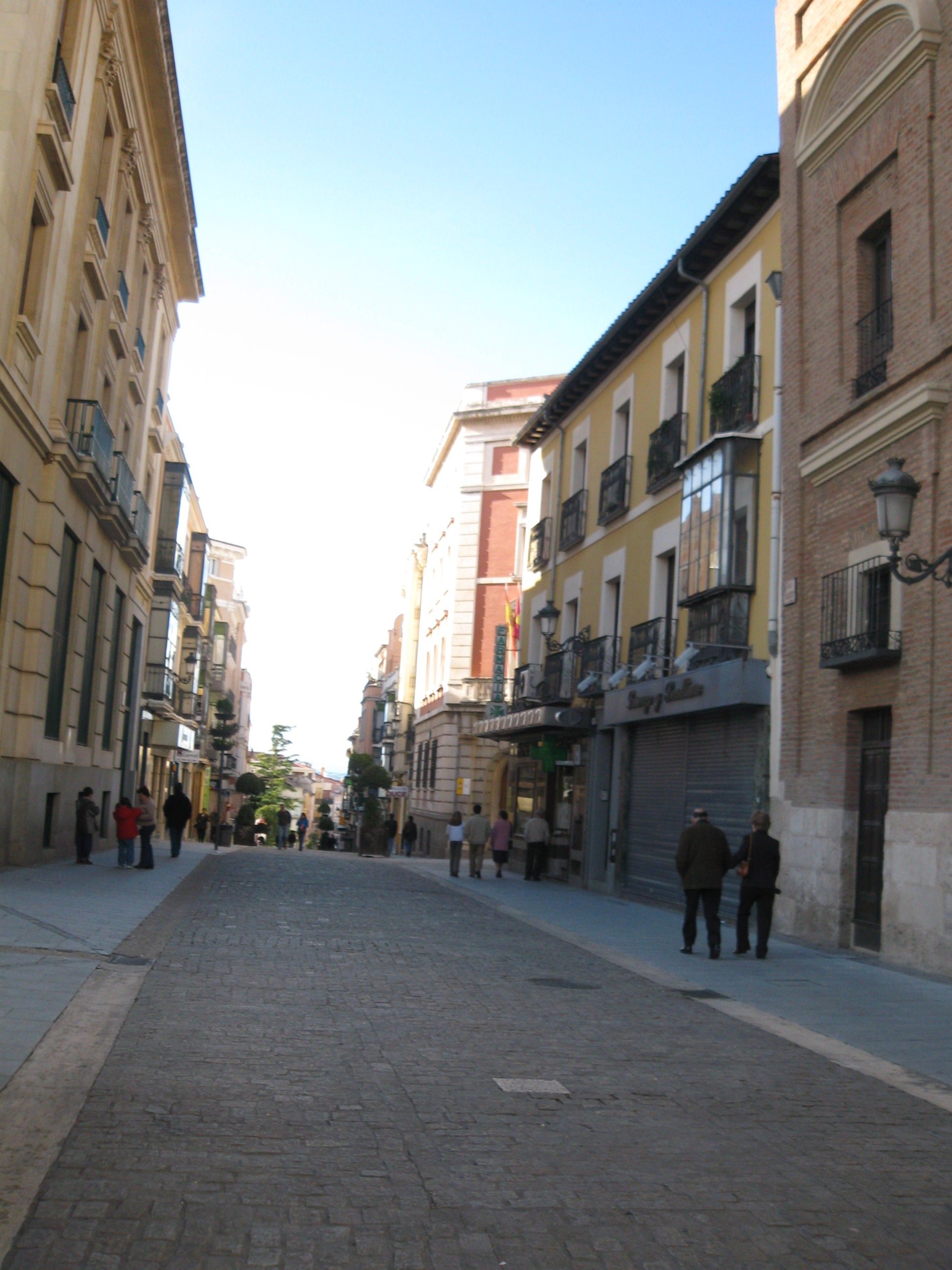 Calle Mayor in Guadalajara, Spain